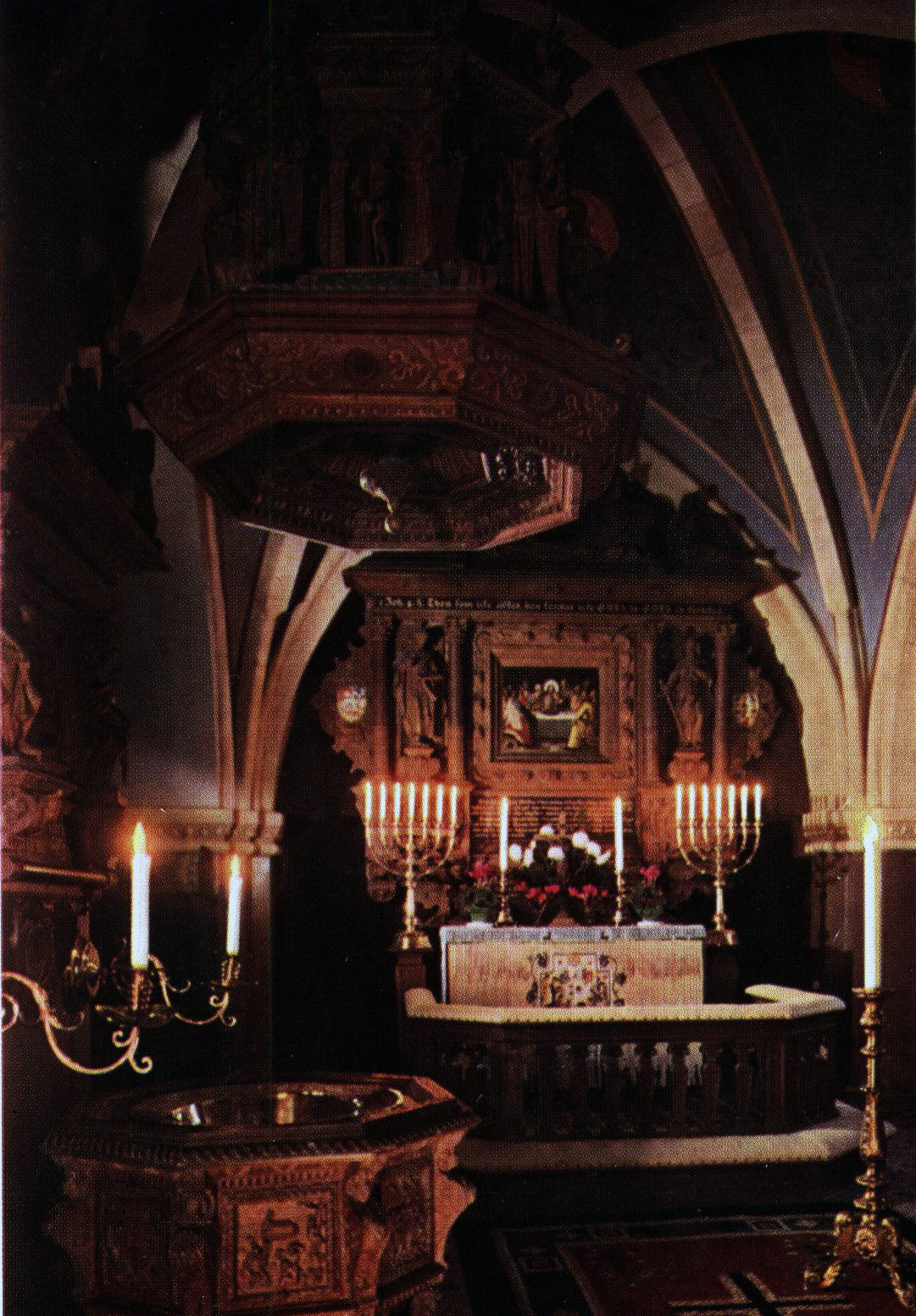 Gårdstånga kyrka. Koret